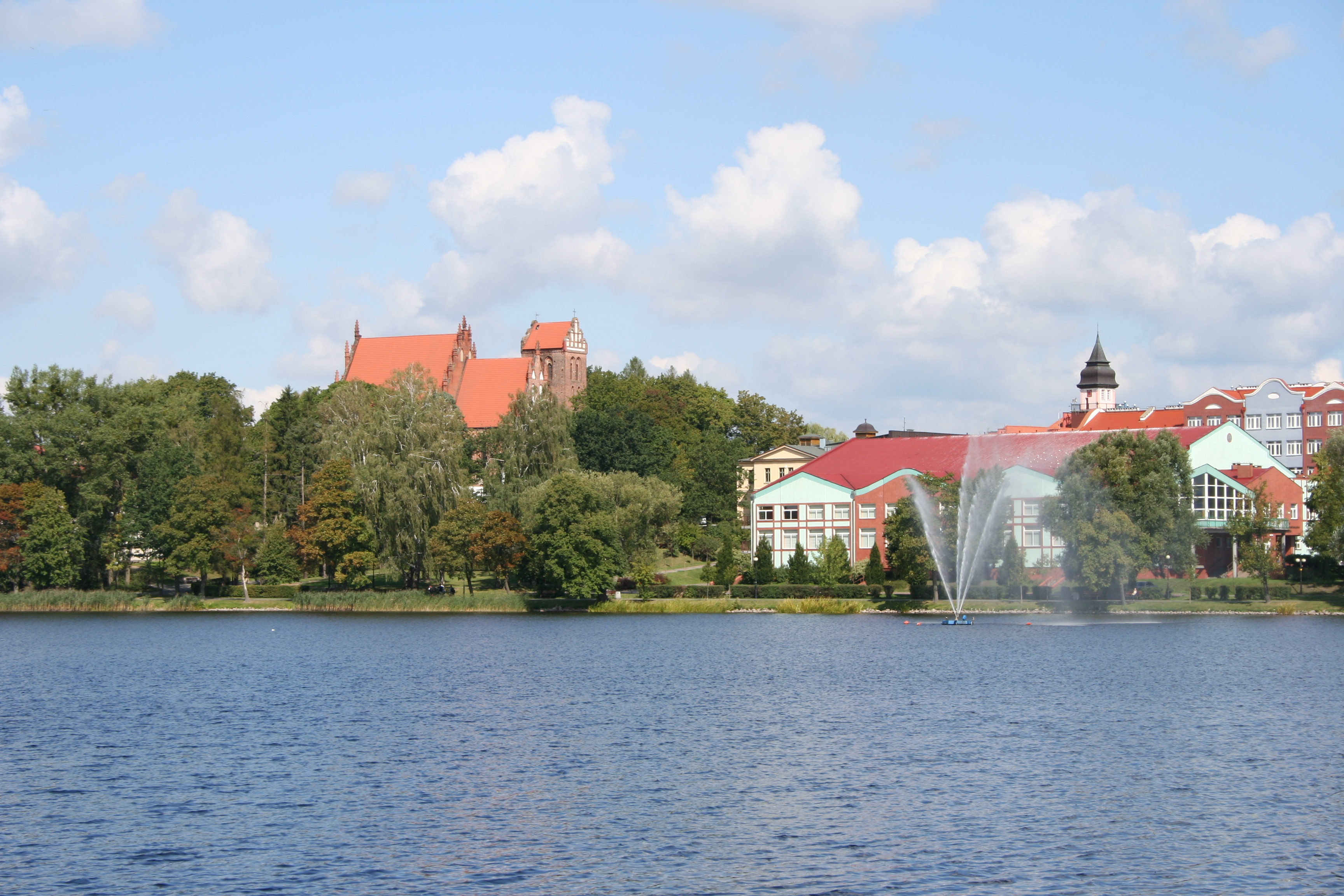 Iława, kościół par. p.w. Przemienienia Pańskiego, 1 poł. XIV